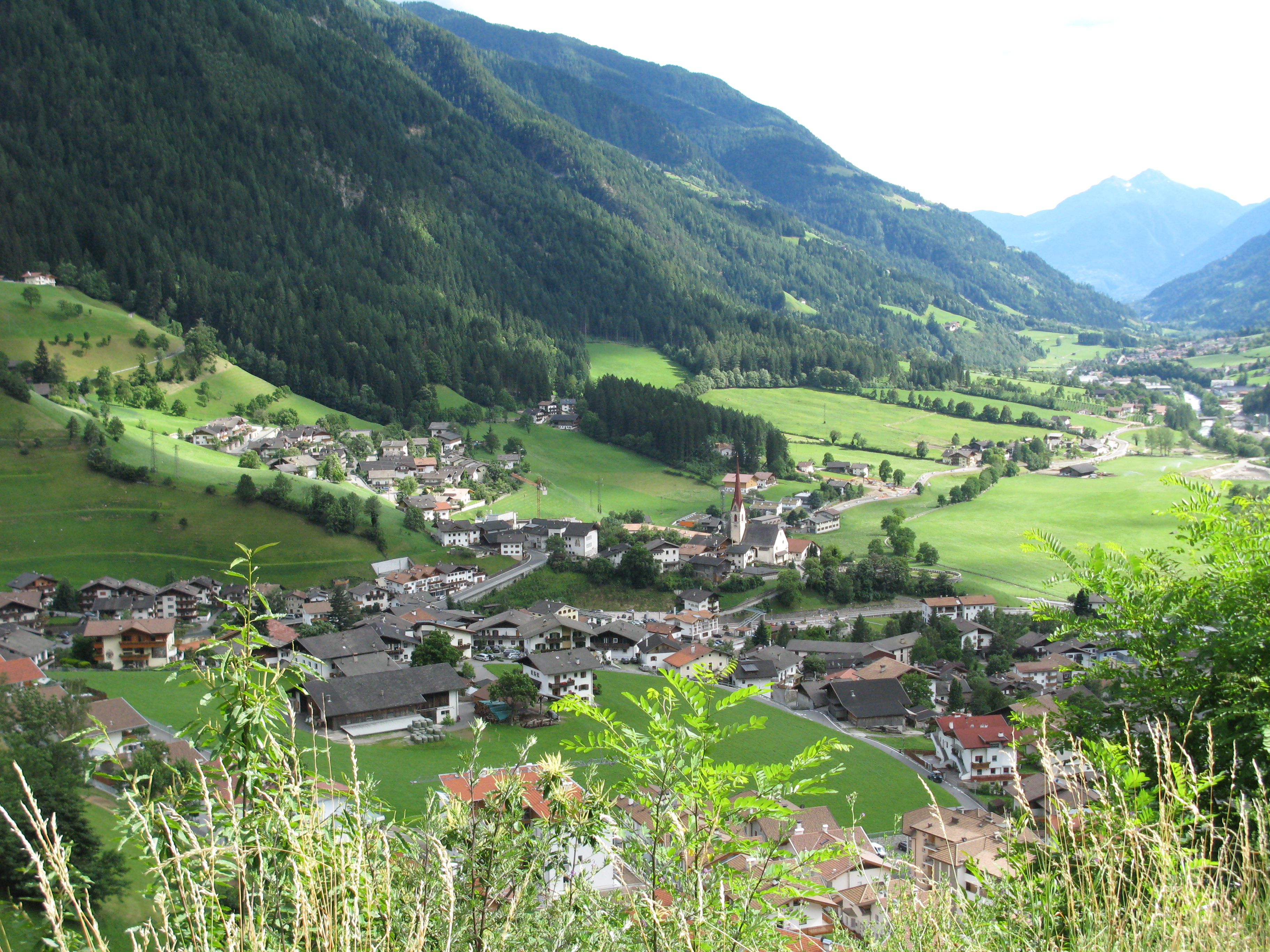 San Leonardo vun der Passstrooss fir op de Jaufenpass aus gesinn.